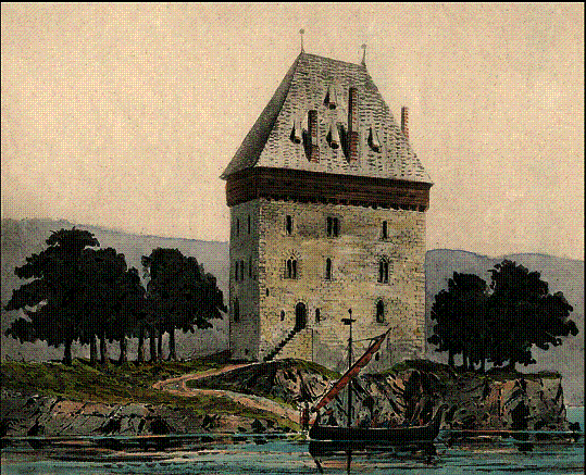 Et forsøk på rekonstruksjon av Mjøstkastellet i Ringsaker i Hedmark fylke, av Peter Blix.